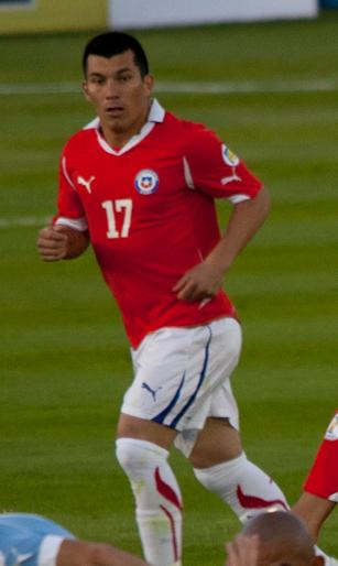 Gary Medel jugando para la seleccion de Chile frente a Uruguay